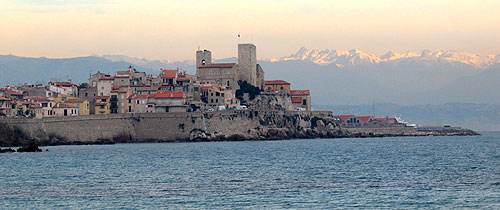 Photo d'Antibes un jour d'hiver avec les Préalpes en arrière-plan